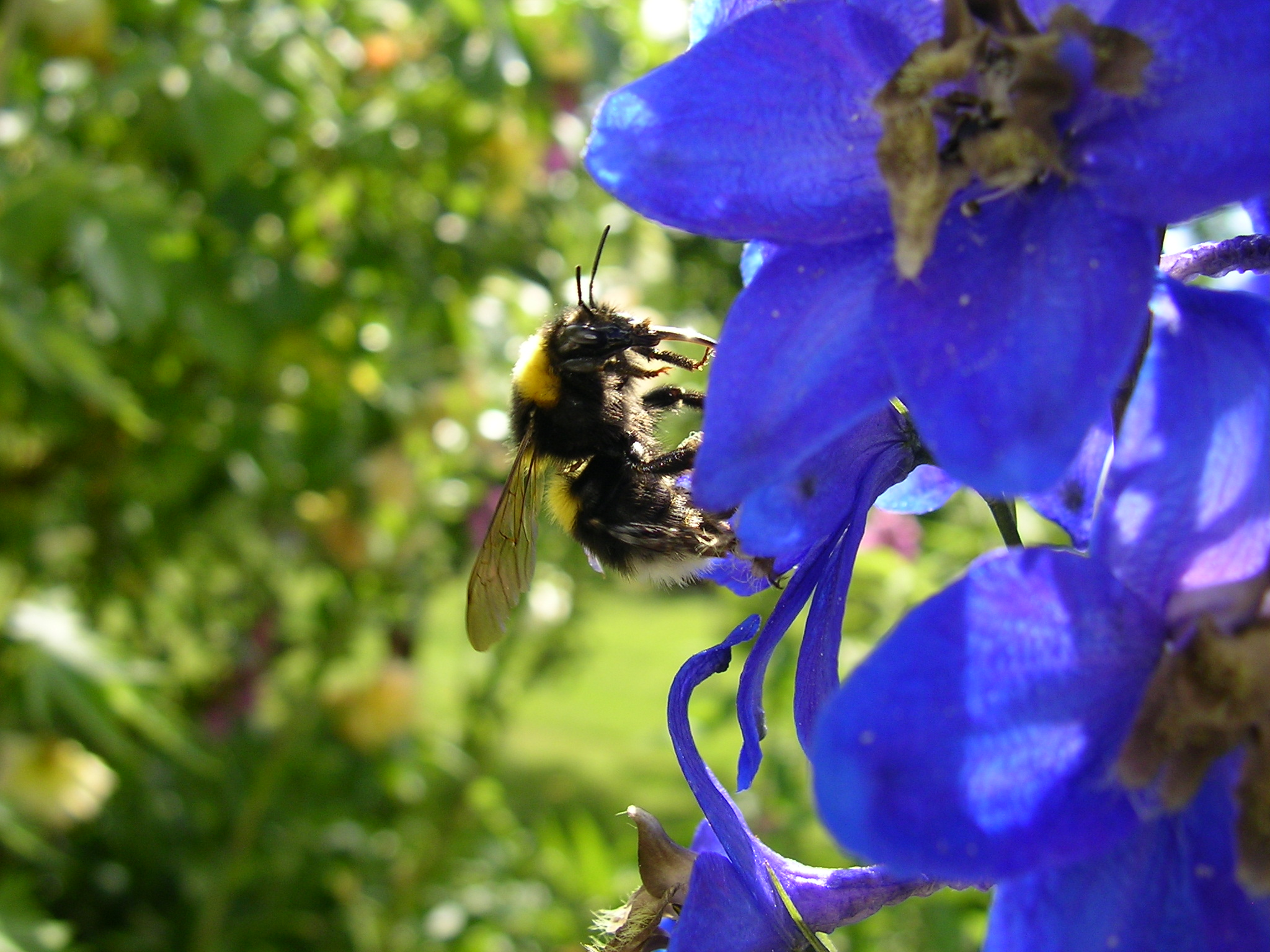 Hummel auf der Pflanze Hoher Rittersporn